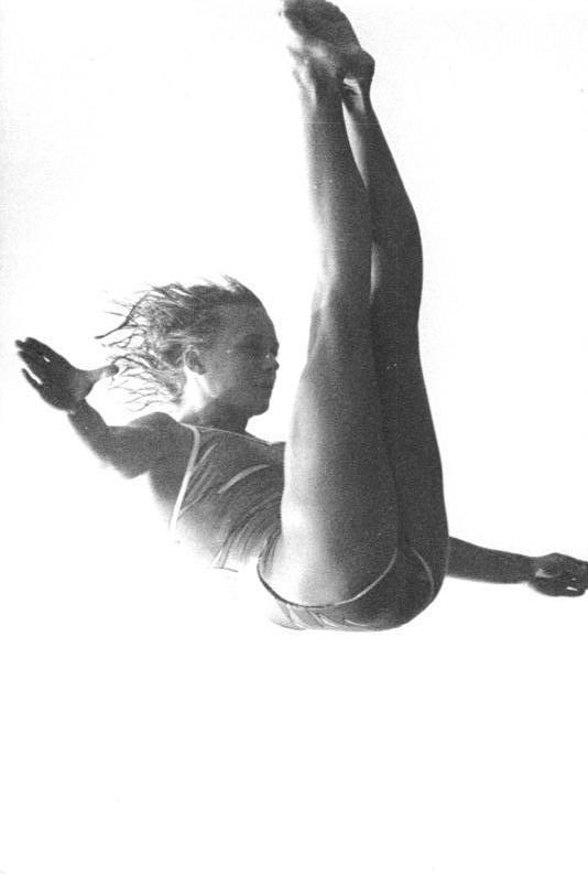 Ute Wetzig ADN-ZB Gahlbeck 23.6.89 Leipzig: 40. DDR-Meisterschaften im Wasserspringen- Im Turmspringen der Damen wurde Ute Wetzig (SC Chemie Halle) mit 434,45 Punkten neue Meisterin.